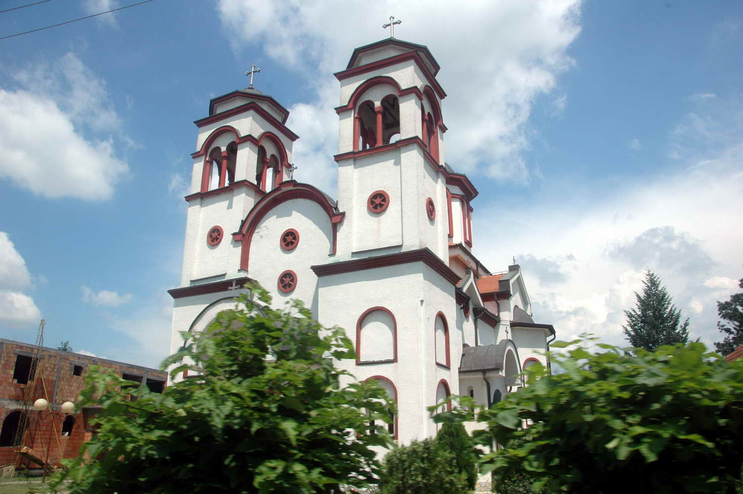 Crkva Svetog Nikole u Supska kod Ćuprije